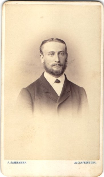 Porträtfotografie von Joseph Samhaber mit rückseitiger Widmung eines "Lupin" an einen "Rehlingen". Vermutlich Theodor Freiherr von Lupin (1846–1896), ältester Sohn von Adolph von Lupin (1811-1888), gestorben als kgl. bayerischer Forstmeister in Wolfratshausen [1], vgl. Kösener Corpslisten 1960, 108 Nr. 260. Die Widmung galt wohl Richard Frhr. von Rehlingen und Haltenberg (rec. 1867) † Forstrat a.D. München 1919 (KCL 60, 108, 273). Die Todesumstände Lupins sind bis heute wohl ungeklärt und ein Gedenkstein markiert die Stelle, an der seine Leiche gefunden wurde.